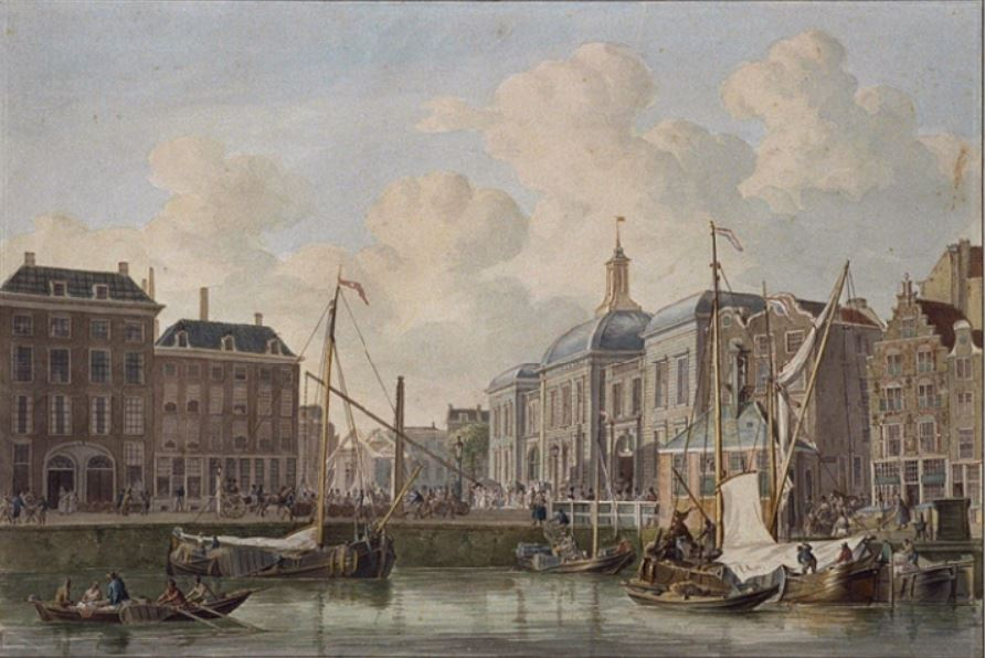 Port et quartier de Beursplein, dans les années 1800.